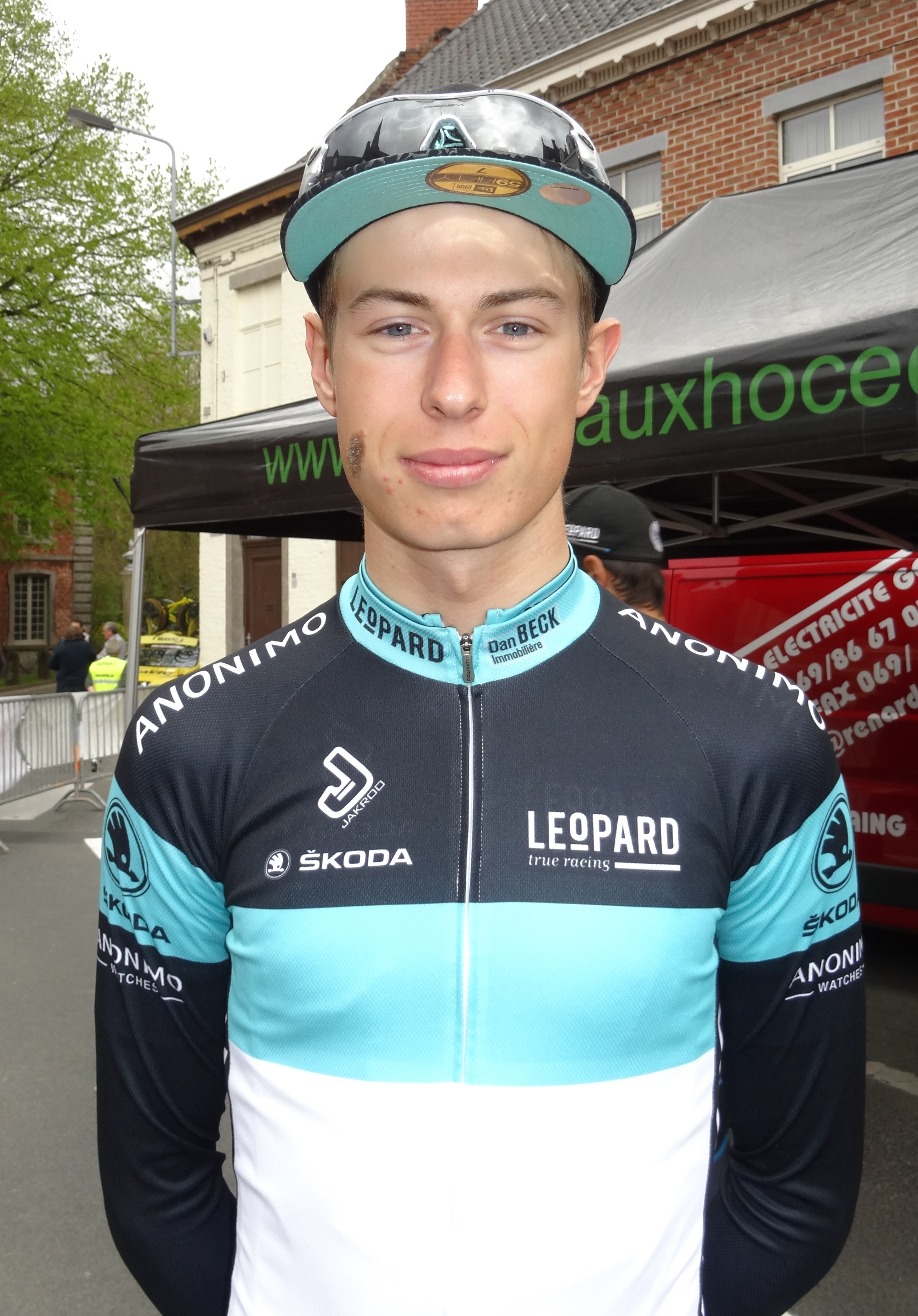 Triptyque des Monts et Châteaux 2014, étape 3, 6 avril 2014, départ de Belœil. Depicted person: Alex Kirsch Depicted team: Leopard Development The creation of these files was made possible thanks to the organizers of the Triptyque des Monts et Châteaux 2014 English | français | +/−